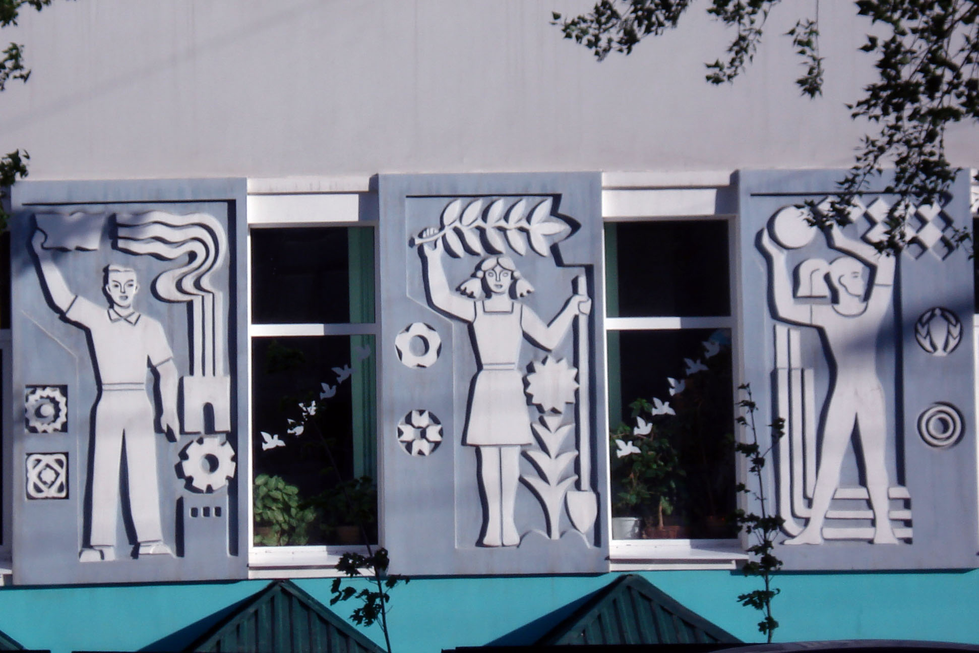 Доходный дом И.М. Трофименко: улица Красноармейская, 158/73, проспект Семашко, литер А, Ростов-на-Дону, Ростовская область